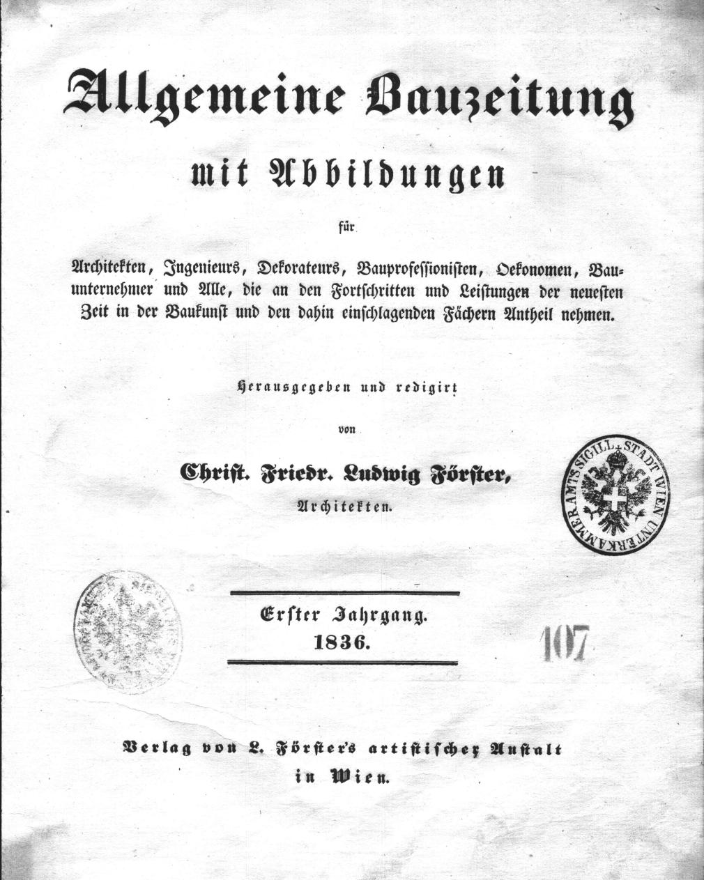 Titelblatt der Allgemeinen Bauzeitung (erste Ausgabe von 1836)